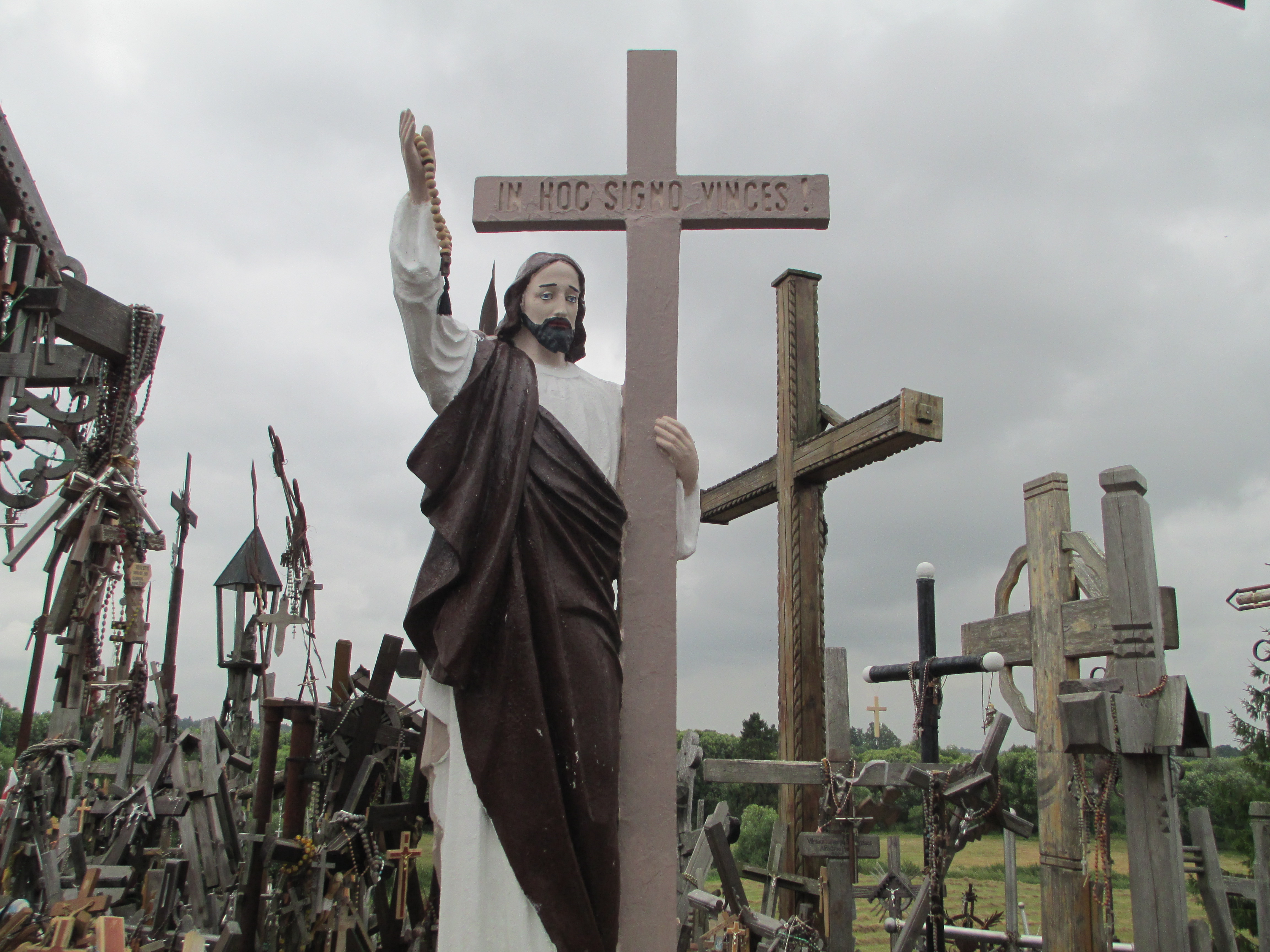 גבעת הצלבים בליטא